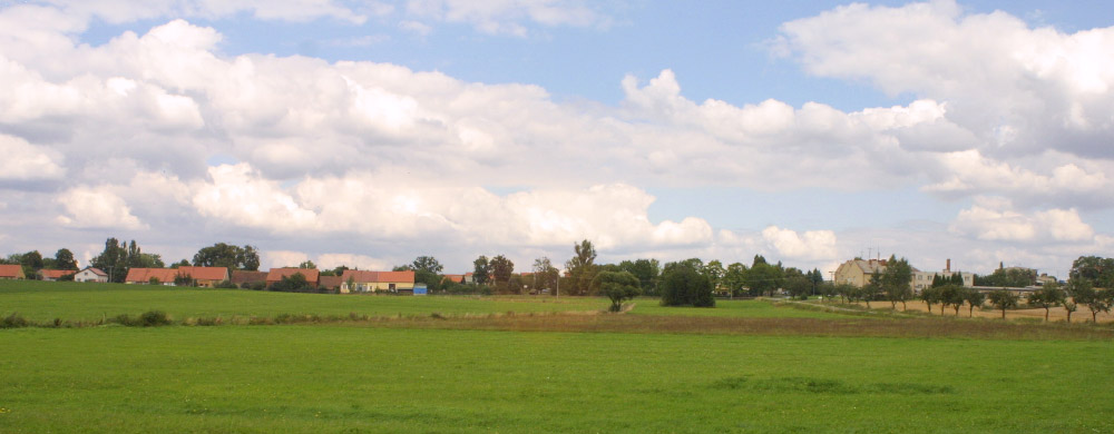 Pohled na ves Dřevec od jihu.